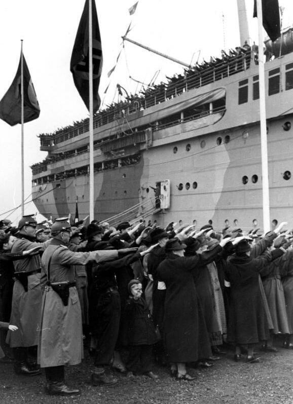 Stettin, Ankunft von Umsiedlern Stettin Baltenumsiedlung: Ankunft eines Rückwandererschiffes im Hafen Das Rückwandererschiff "General von Steuben" ist in Stettin eingelaufen, das Deutschlandlied erklingt, und die am Kai versammelte Menge grüsst die Heimkehrenden. [Stettin, Hafen.- Begrüßung ankommmender Umsiedler mit dem Hitlergruß]